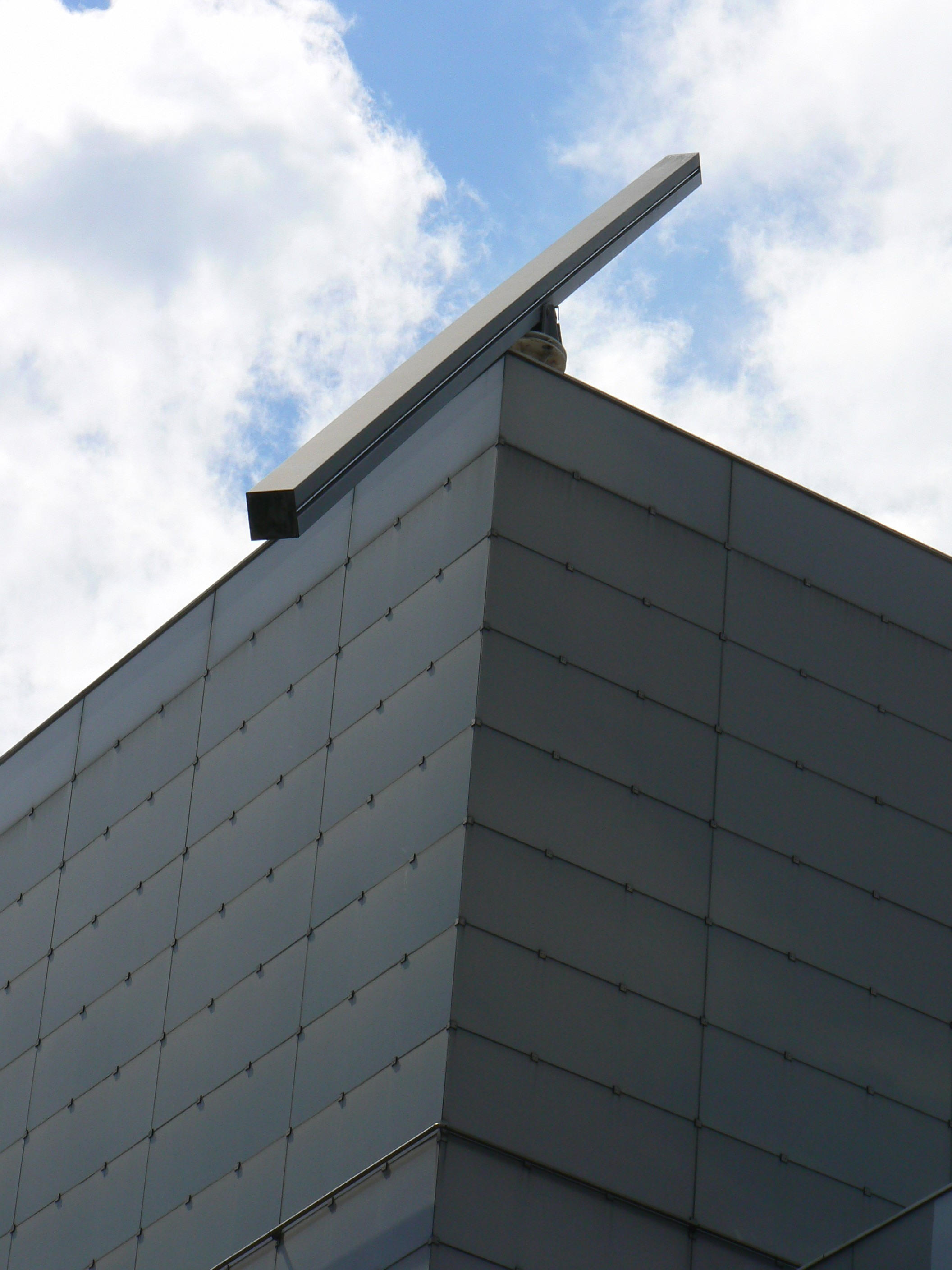 Light sculpture "Energielijn" (1988) by Jan van Munster in Rotterdam/The Netherlands